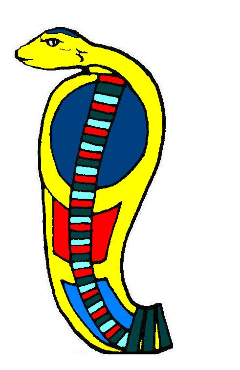 Ureus.JPG